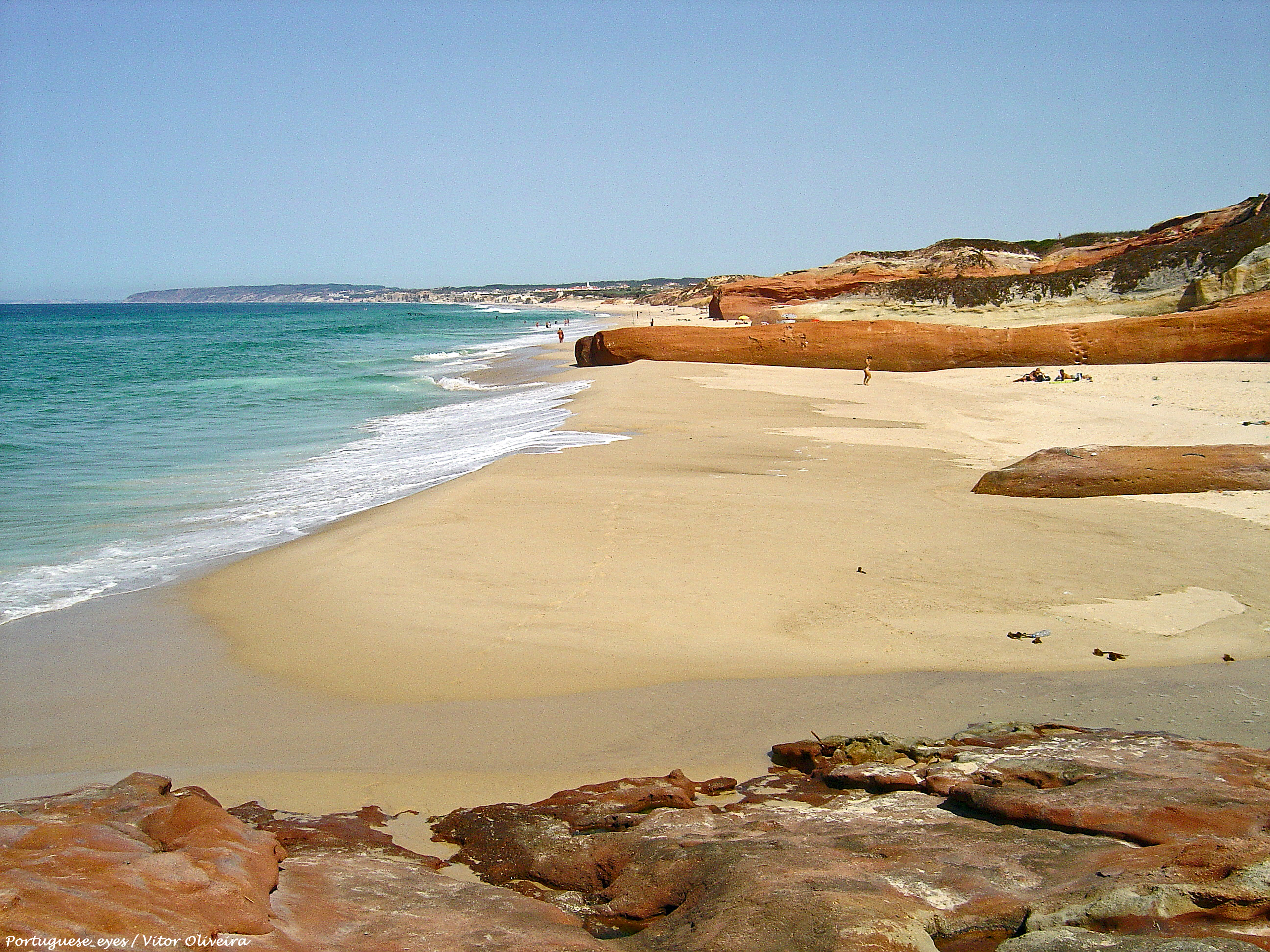 Praia de Pedras Muitas ou da Almagreira - Portugal